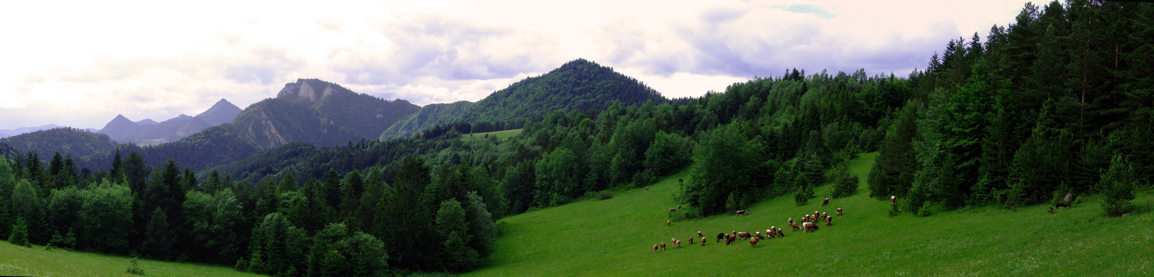 Pieniny Właściwe i Golica. Widok z okolic przełęczy Limierz